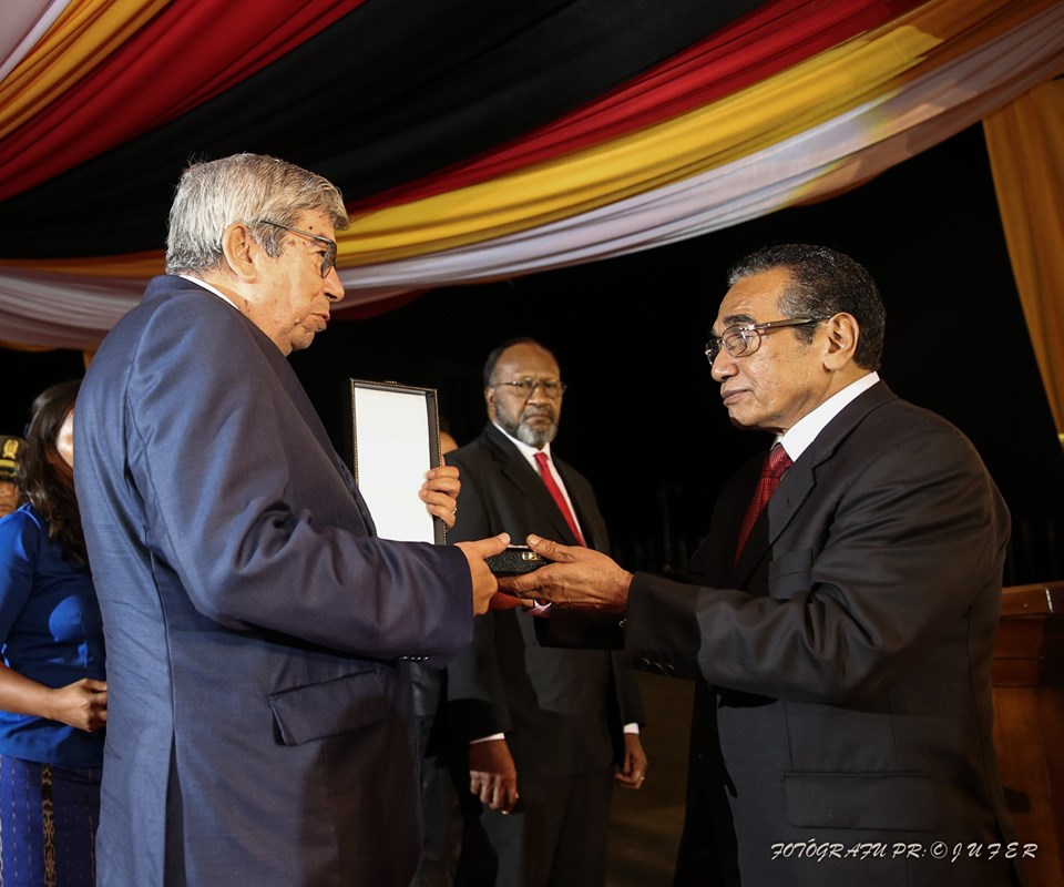 Eduardo Ferro Rodrigues bekommt für das portugiesische Parlament den Ordem de Timor-Leste von Francisco Guterres bei den Feierlichkeiten zum zwanzigsten Jubiläum des Unabhängigkeitsreferendums.